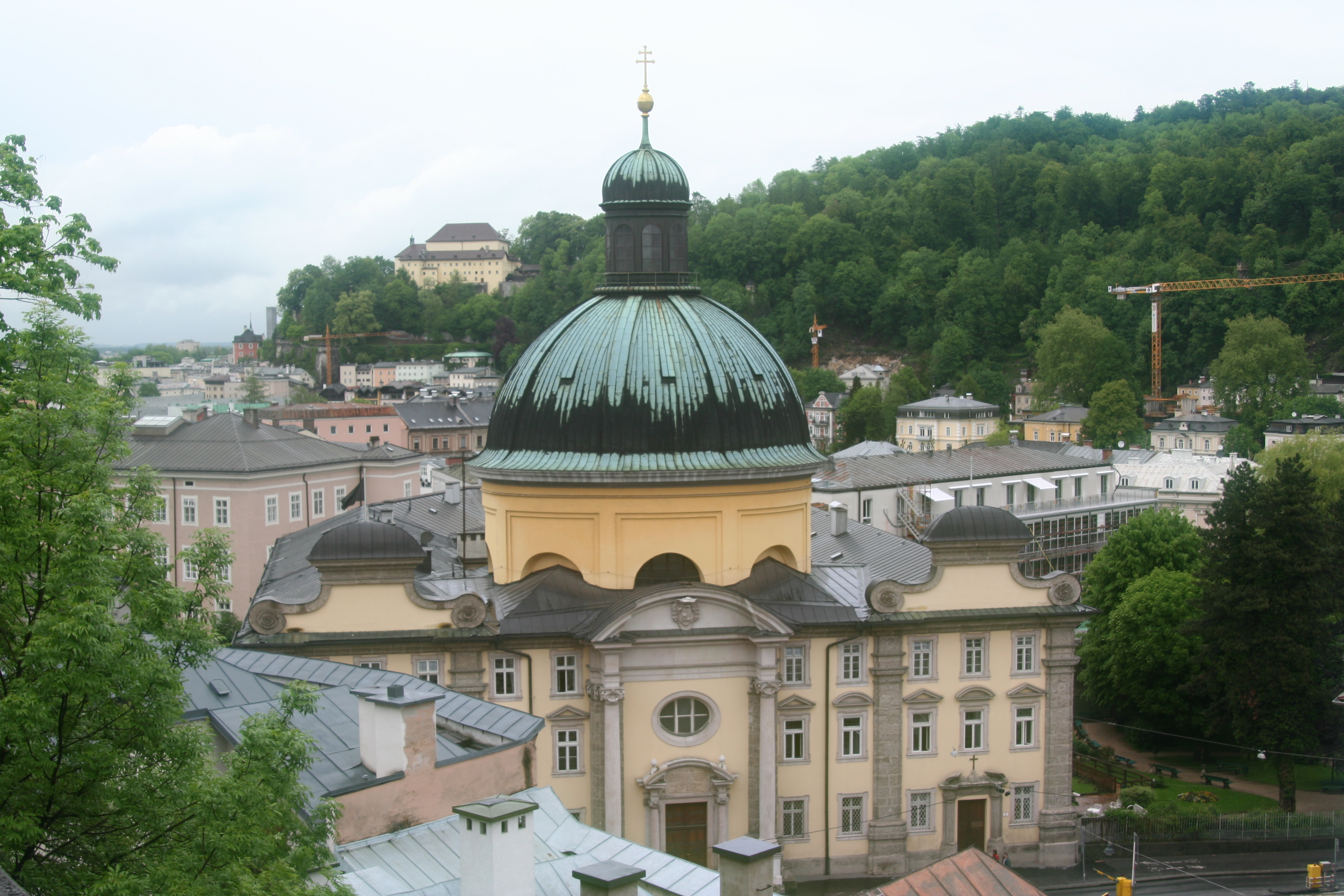 Salzburg, Kajetanerkirche